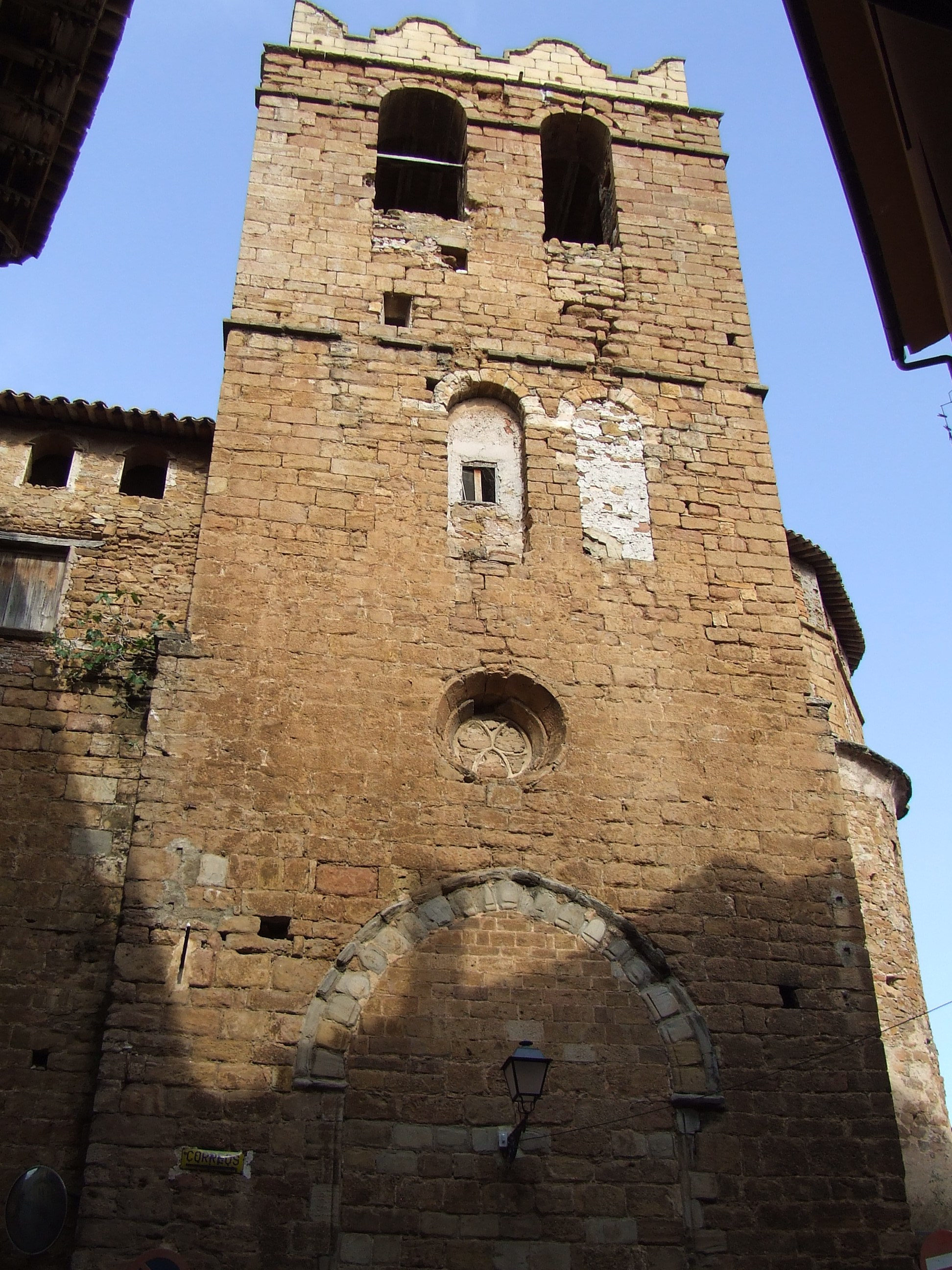 Detall del cloquer de sant Martí (Talarn, Pallars Jussà)